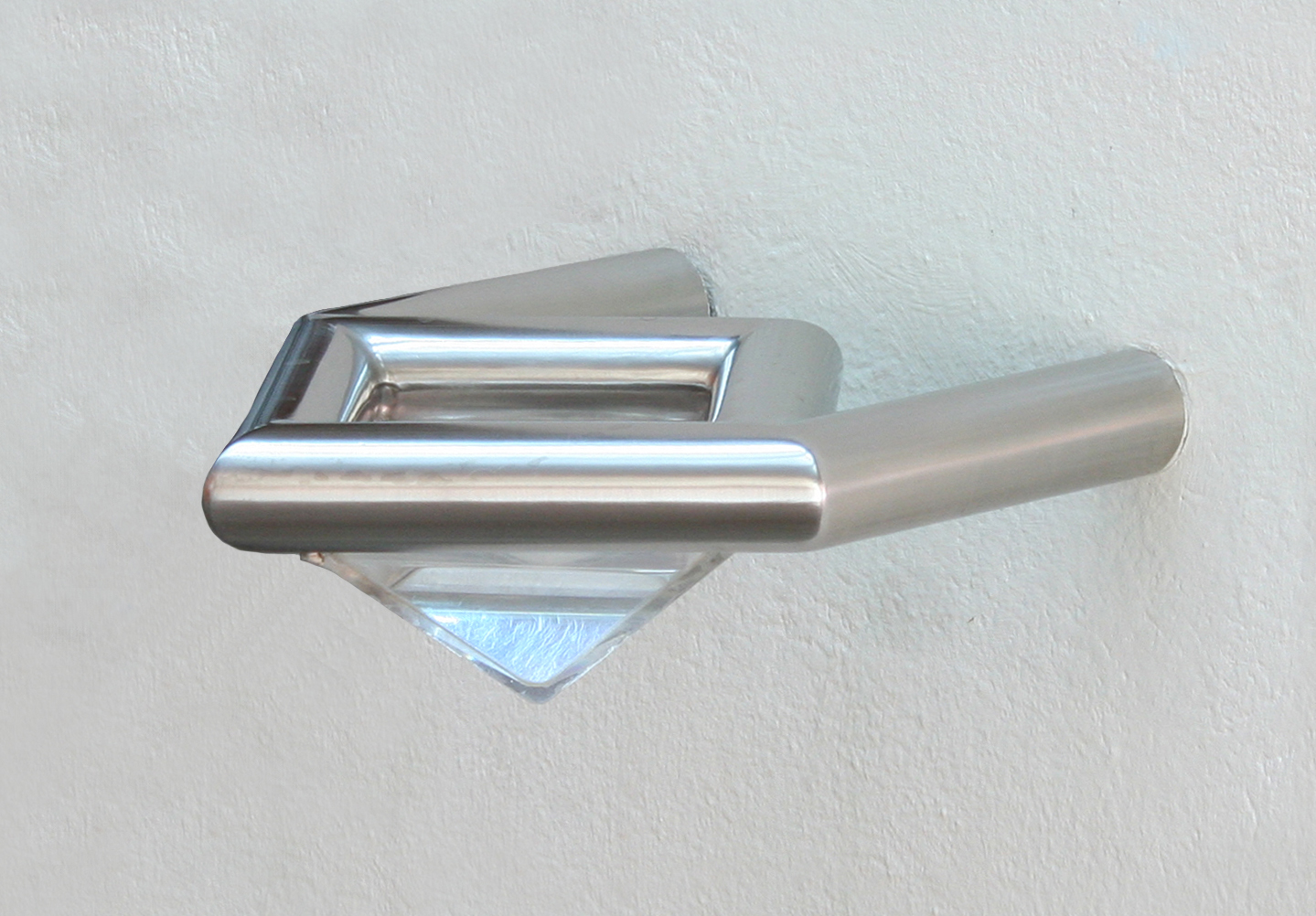 Römisch-katholische Pfarrkirche Christkönig Kloten, Weihwasserbecken